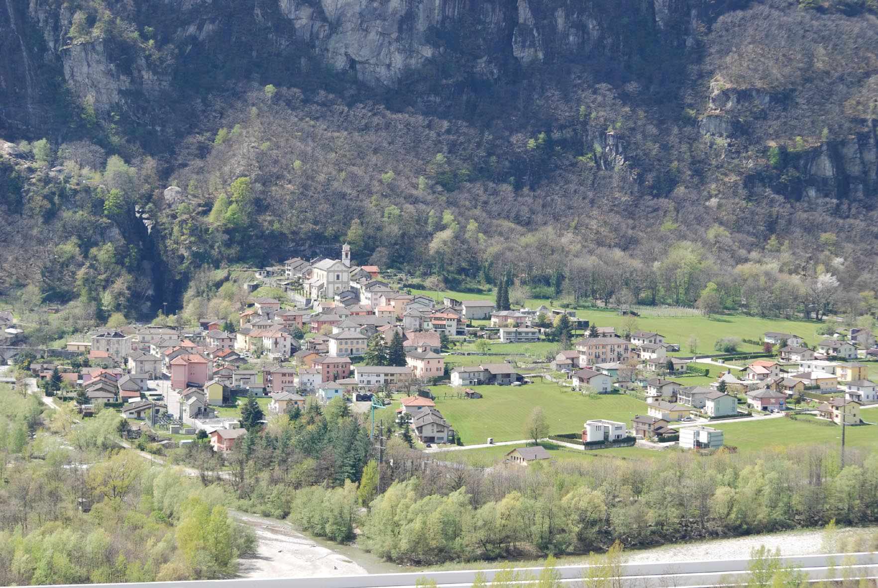 Data 19 aprile 2008